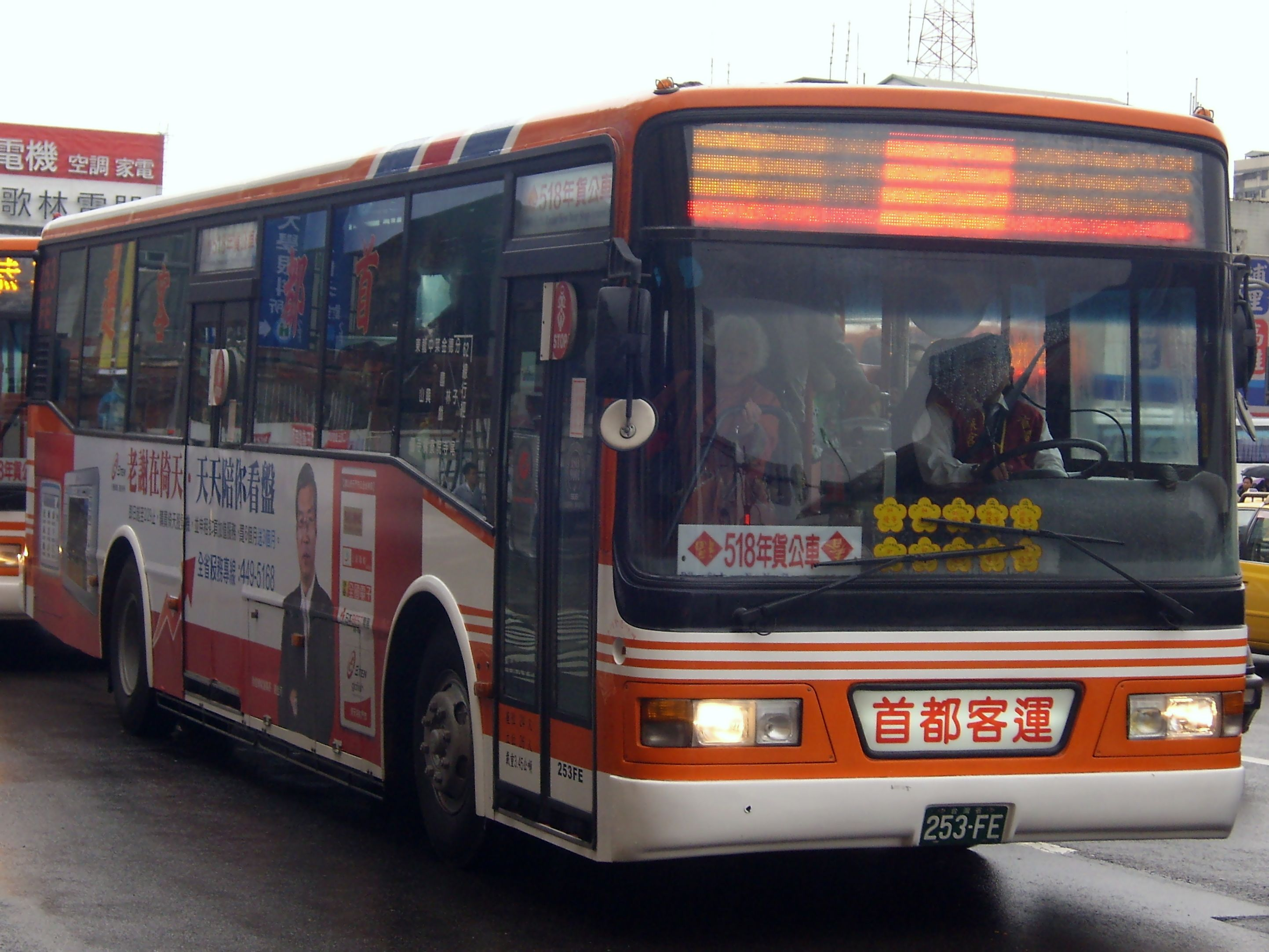 首都客運2005年日野ERK2JRL大客車253-FE，固特車體，行駛臺北市聯營公車518年貨公車。